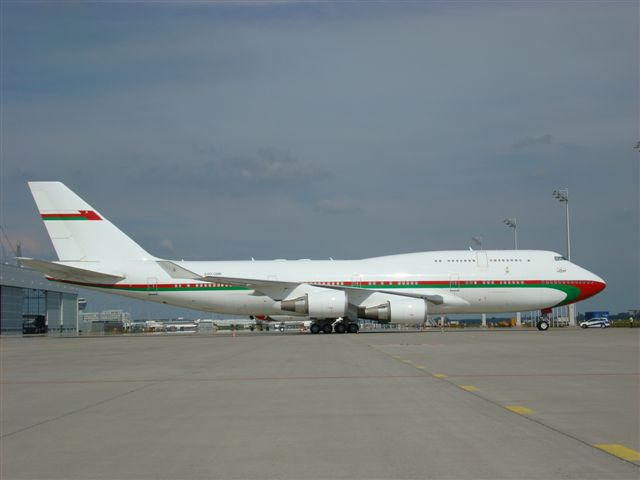 747-400 des Sultans von Oman